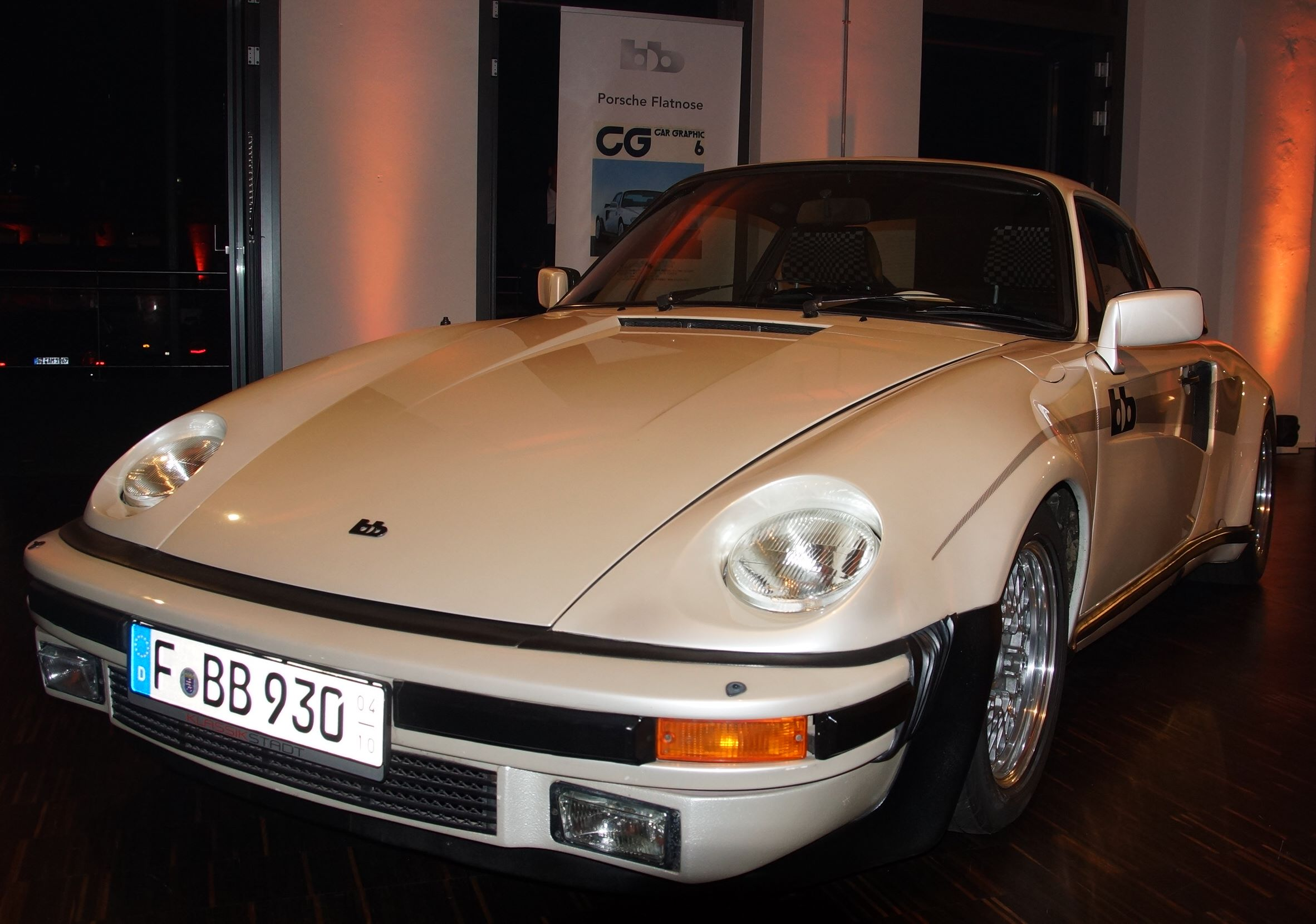 bb Flatnose Porsche bei der Enthüllung des bb Moonracer in der Klassikstadt Frankfurt am 20.-21. September 2014